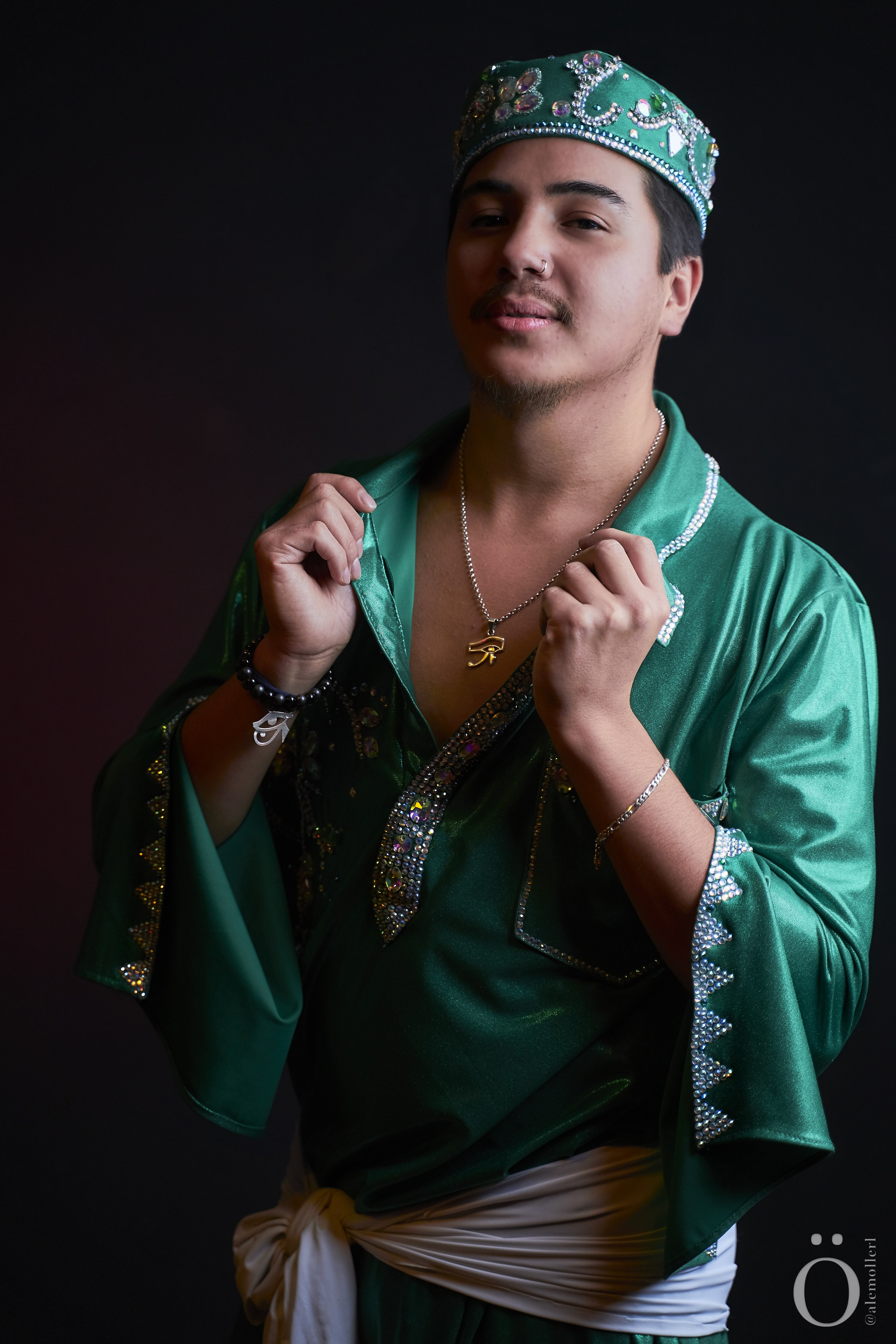 Hombres en la Danza Arabe